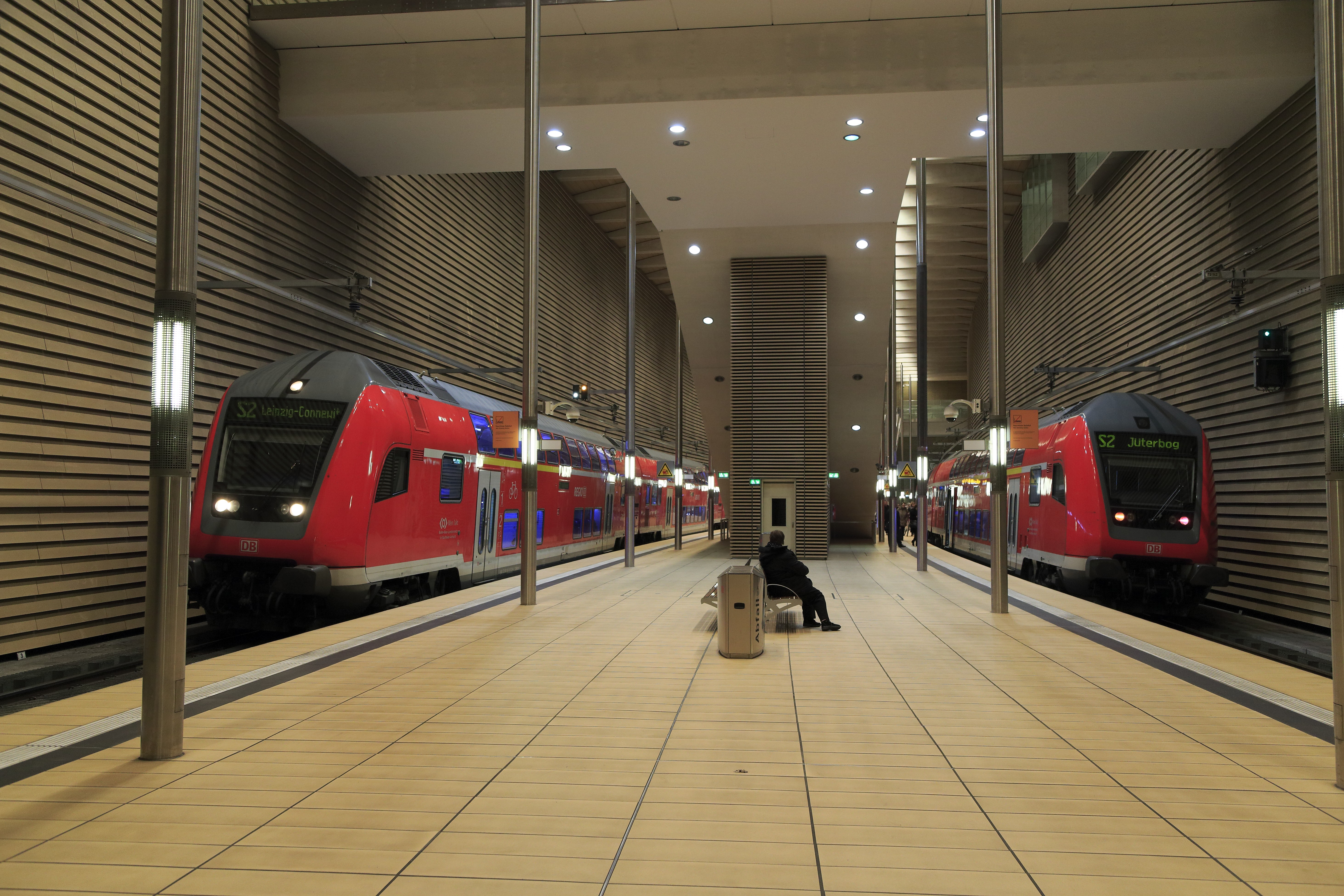 Seit dem Fahrplanwechsel im Dezember 2015 wurde die Linie S2 bis zur Indienststellung der zweiten Bauserie der Triebzugreihe 1442 für die Mitteldeutsche S-Bahn mit Doppelstockwendezügen, die mit Ellok der Reihen 146 und 182 bespannt wurden, bedient. Zeitgleich wurden die Personenzüge Richtung Dessau in den S-Bahn-Betrieb einbezogen, damit besteht im Stadttunnel tagsüber ein durchgehender Fünfminutentakt. Die Wendezüge begegneten sich normalerweise im Hp Markt. Im Vergleich mit dem Neuzustand drei Jahre zuvor sind die Bauwerkswände durch Verschmutzung schon stark nachgedunkelt. Kein Wunder bei nach hinten geneigten Verkleidungselementen. Dass sich auf denen Staub absetzt, sollten auch Architekten wissen.